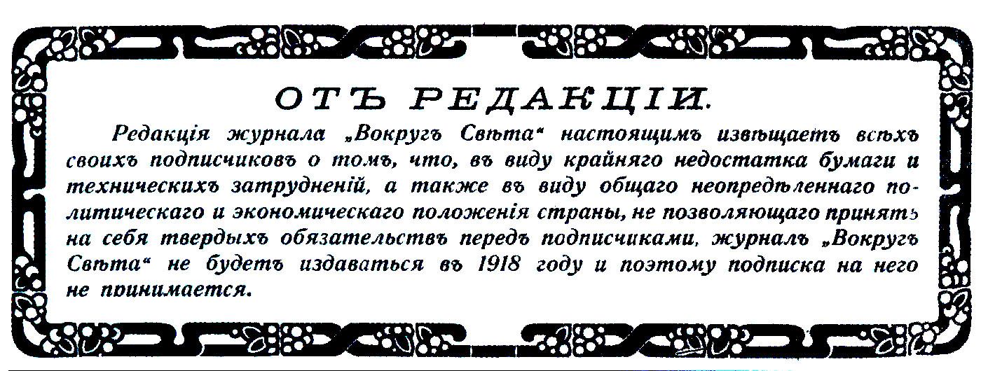 Объявление в журнале "Вокруг света" №49-50 24 декабря 1917 года о прекращении выпуска журнала.